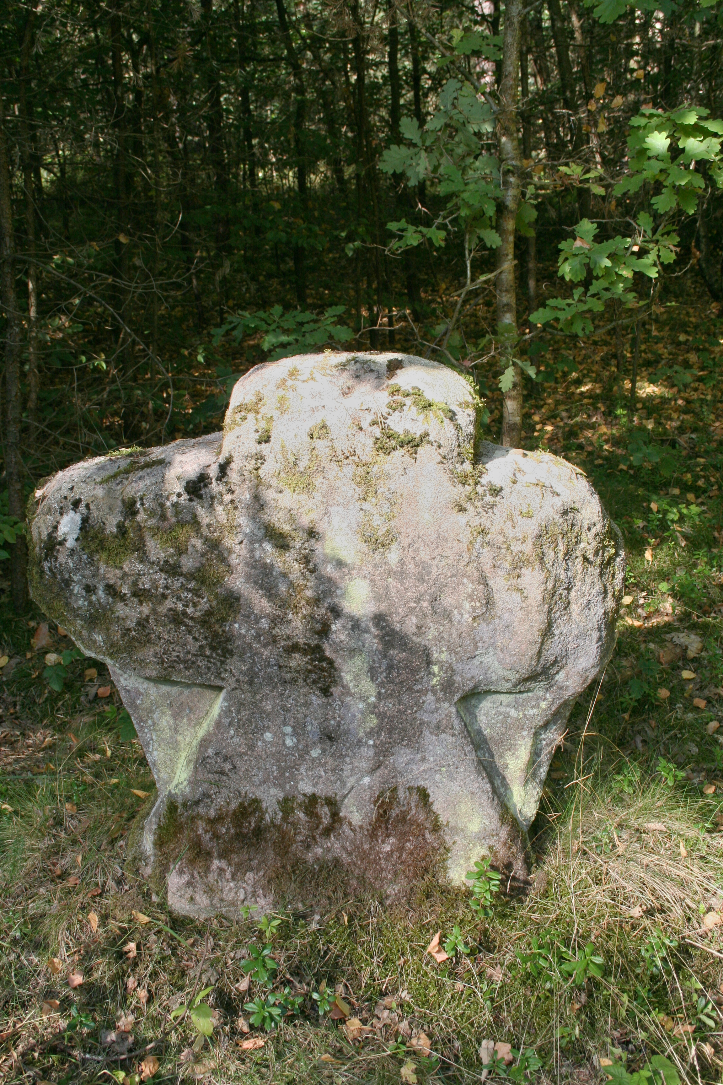 Steinkreuz nahe Sperberslohe